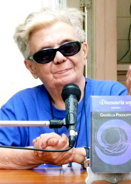 Foto de la ensayista cubana Graziella Pogolotti en Pinar del Río, en el año 2012.